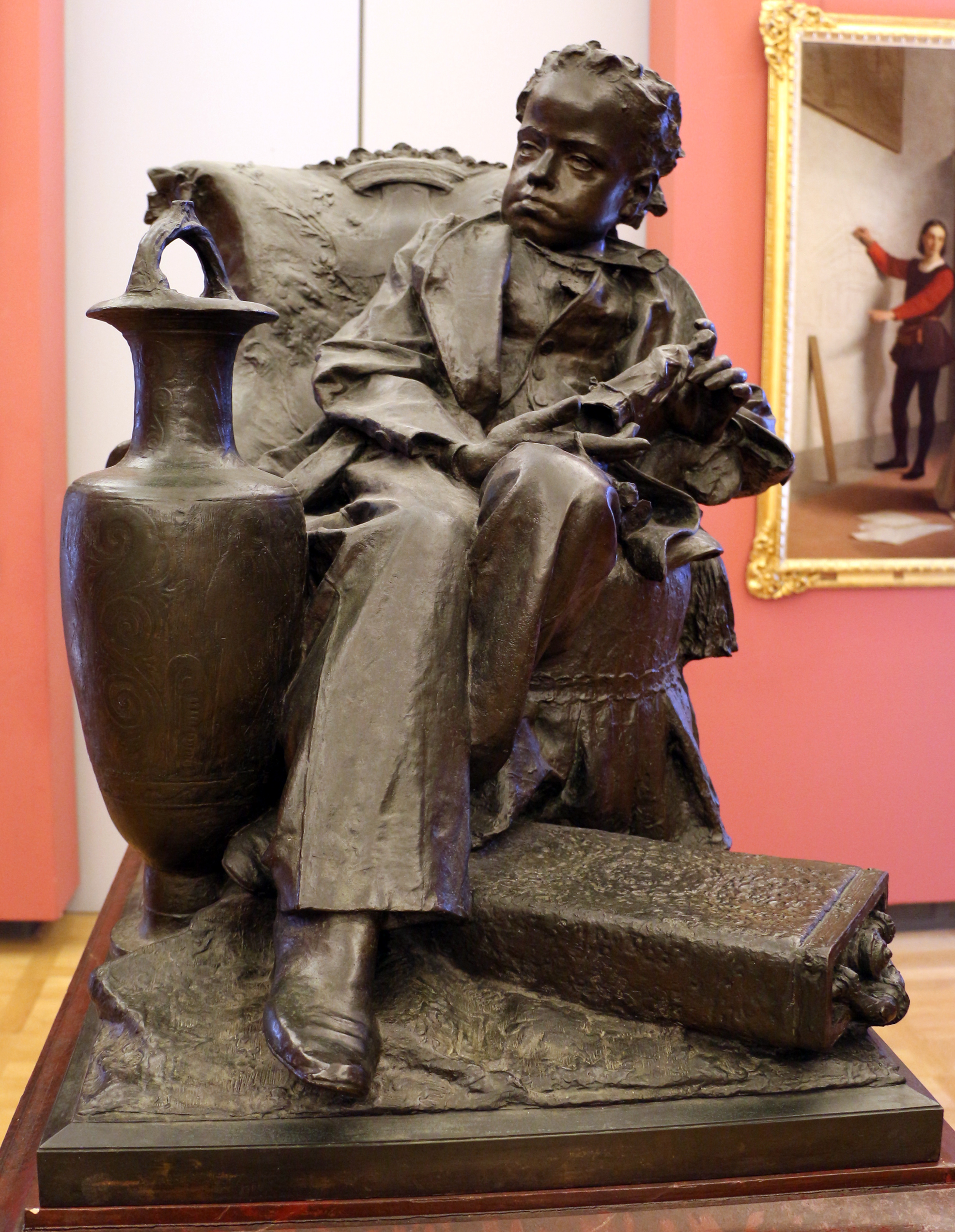 Il parco e i musei di Nervi This is a photo of a monument which is part of cultural heritage of Italy.